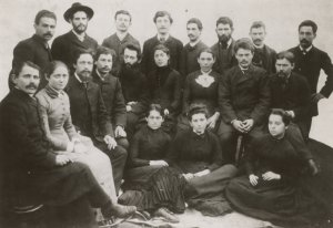 חברי קומונת אודסה החדשה